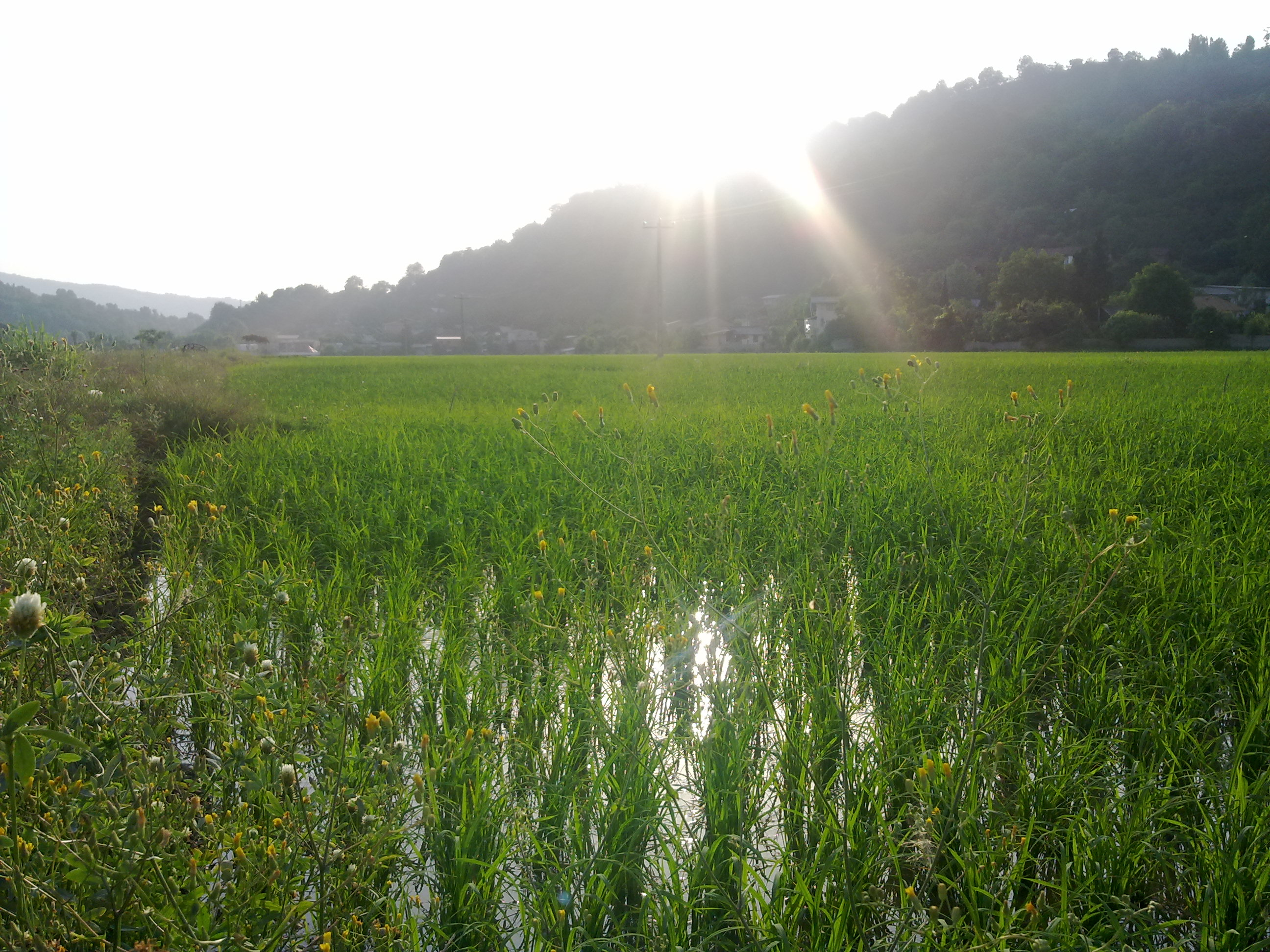 Ahoudasht-Sari-Mazandaran-Iran